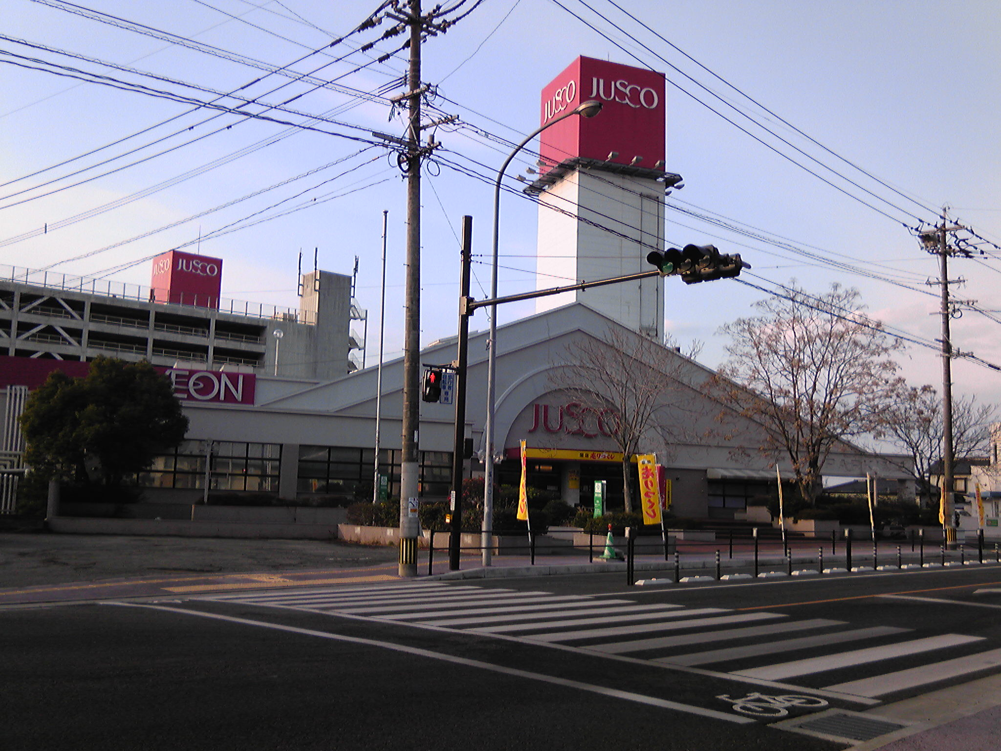 ジャスコ玉名店外観（熊本県玉名市）